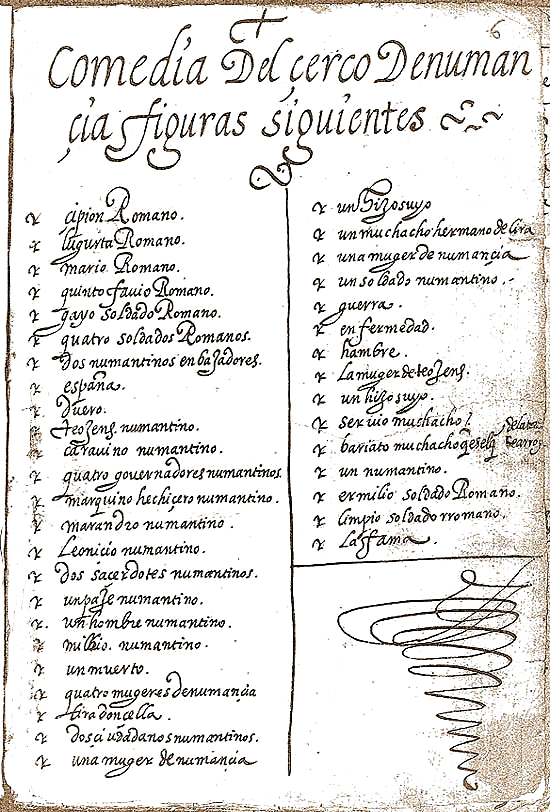 Primera hoja del manuscrito de La Numancia de Cervantes